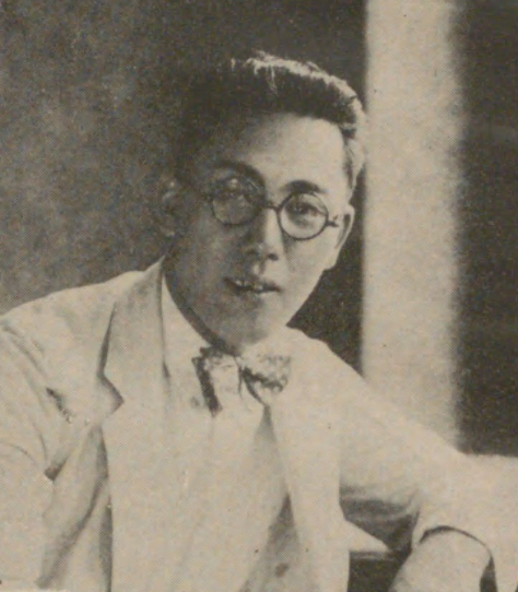 牛山清人 ハリウッド化粧品共同創業者